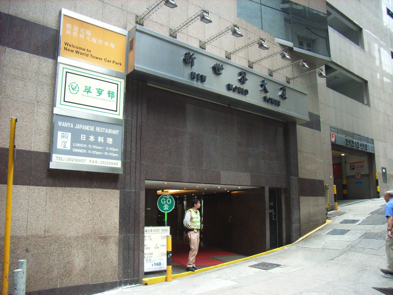 新世界大廈安蘭街入口